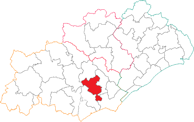 Situation du canton dans le département de l'Hérault.